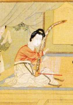 interprata de konghou